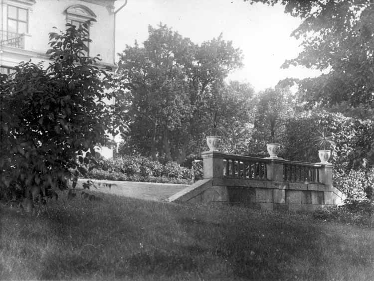 Görvälns slott i Järfälla kommun, i förgrunden terrassen/balustraden, 1920-talet. Del av huvudbyggnaden efter Mauritz Salins ombyggnad 1901, då en veranda med balkong ovanpå byggdes till vid huvudingången. Snäckan, som numera ligger nedanför denna terrass/balustrad, låg inte där då.